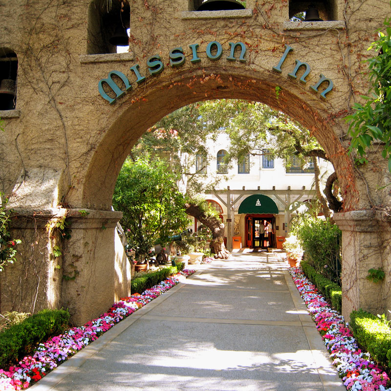 Riverside, CA